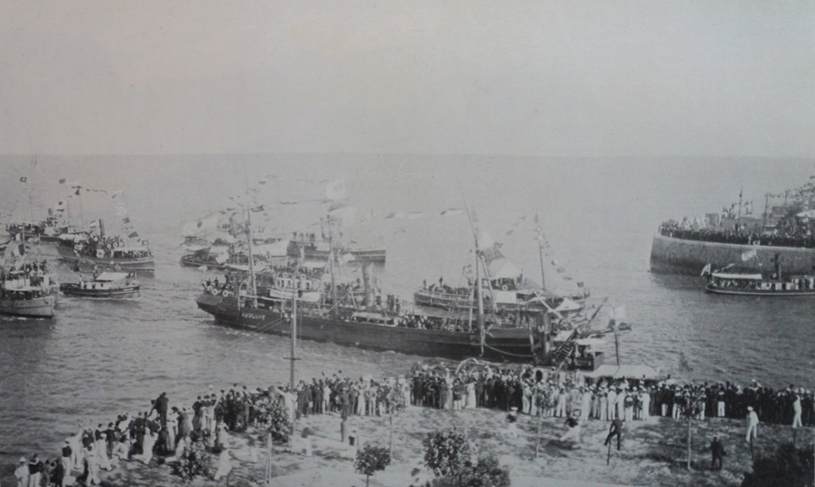 "La gran fiesta fluvial. La «Uruguay» y su comitiva de vapores enfilando la esclusa de la dársena norte."